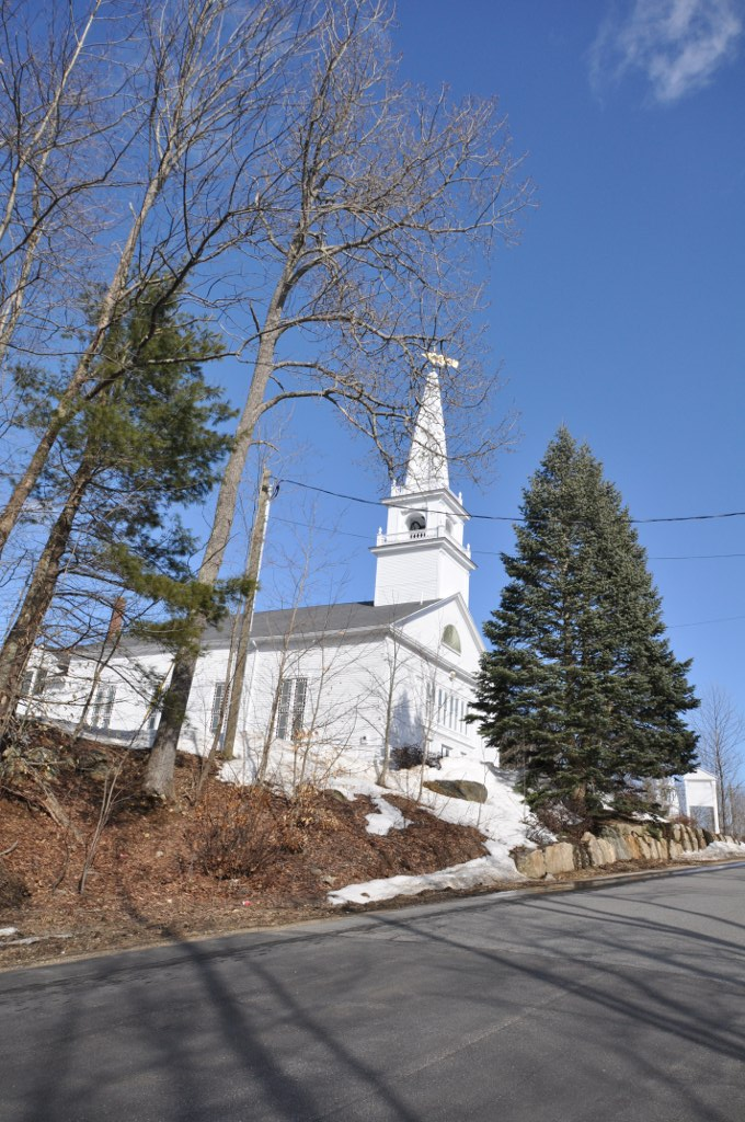 Deerfield Center, Deerfield, New Hampshire